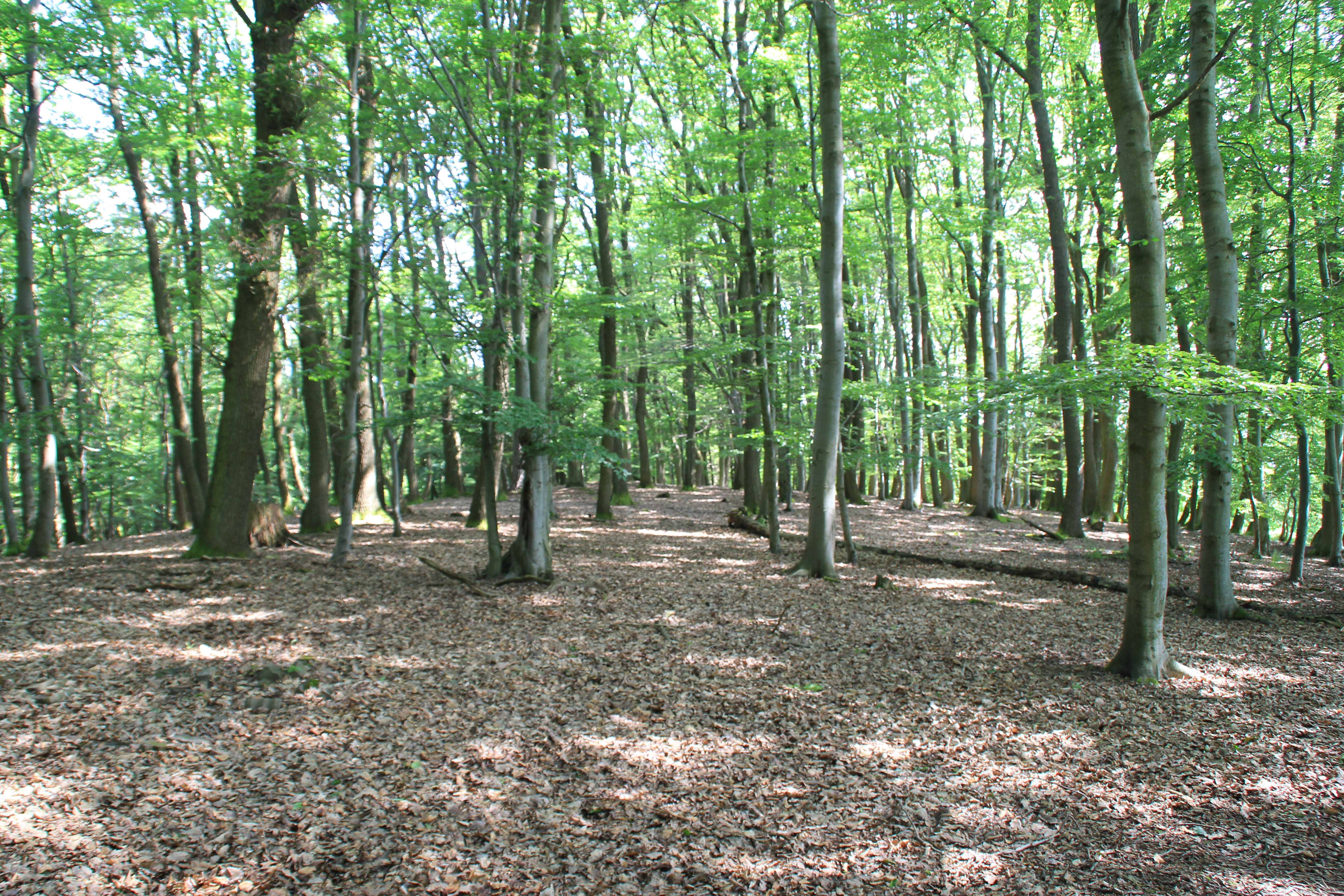 Der Gipfelbereich des Bauersberges bei Mömbris, Bayern